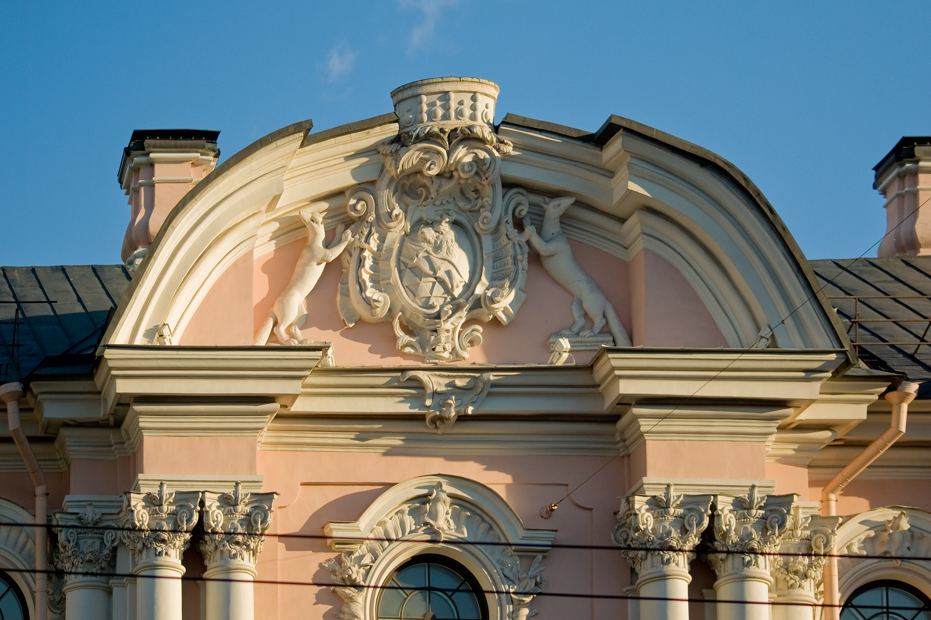 Строгановский дворец, Санкт-Петербург. Картуш с гербом Строгановых.